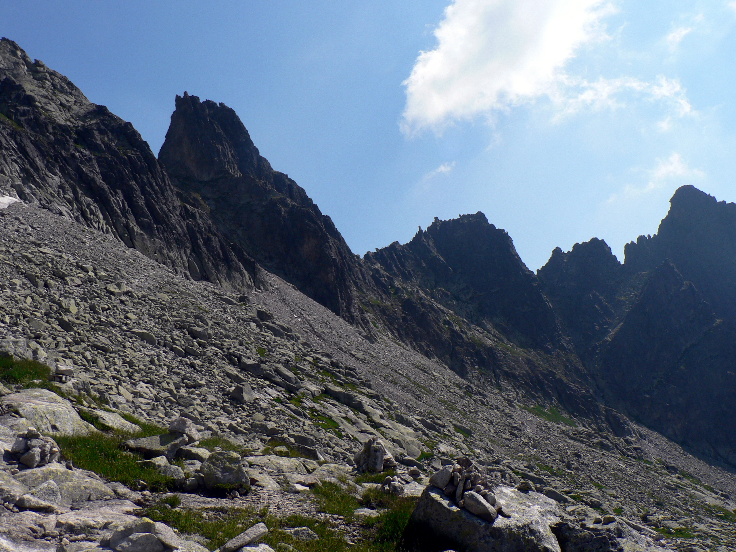 Spąga, Sokola Turnia, Drobna Turnia i Żółty Szczyt ze szlaku z Czerwonej Ławki